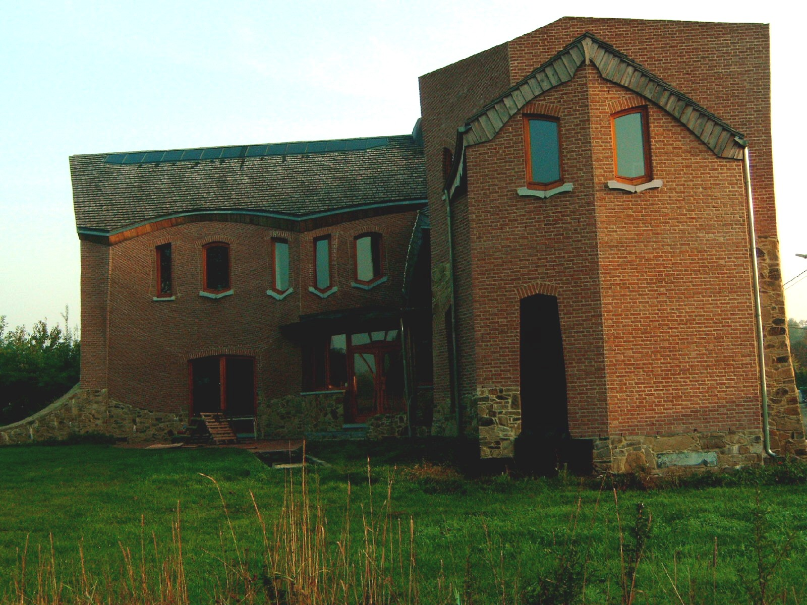 Achterzijde woonhuis van architect Hubert Sauvage in Temploux. Eigen opname.